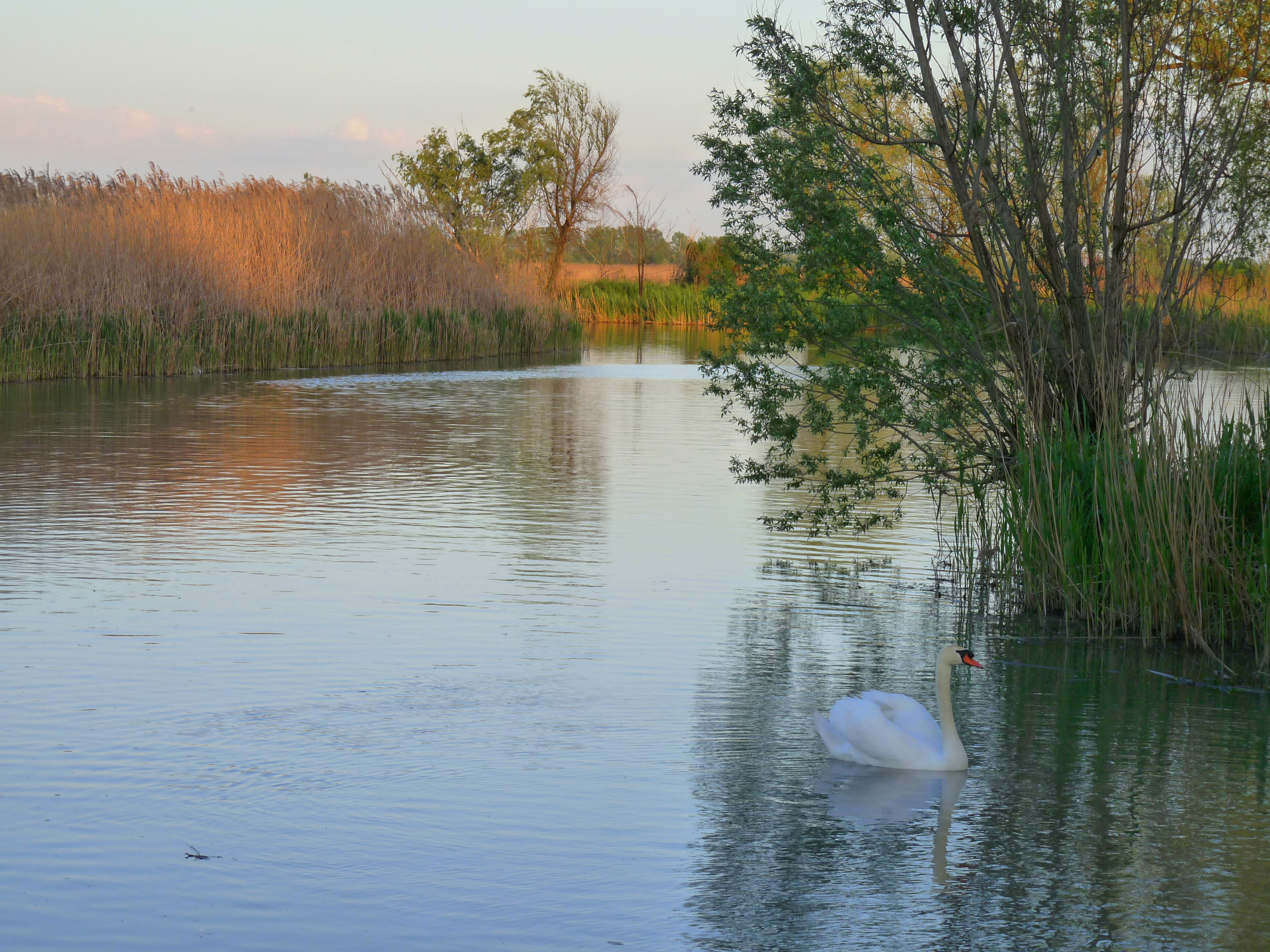 Rivalta